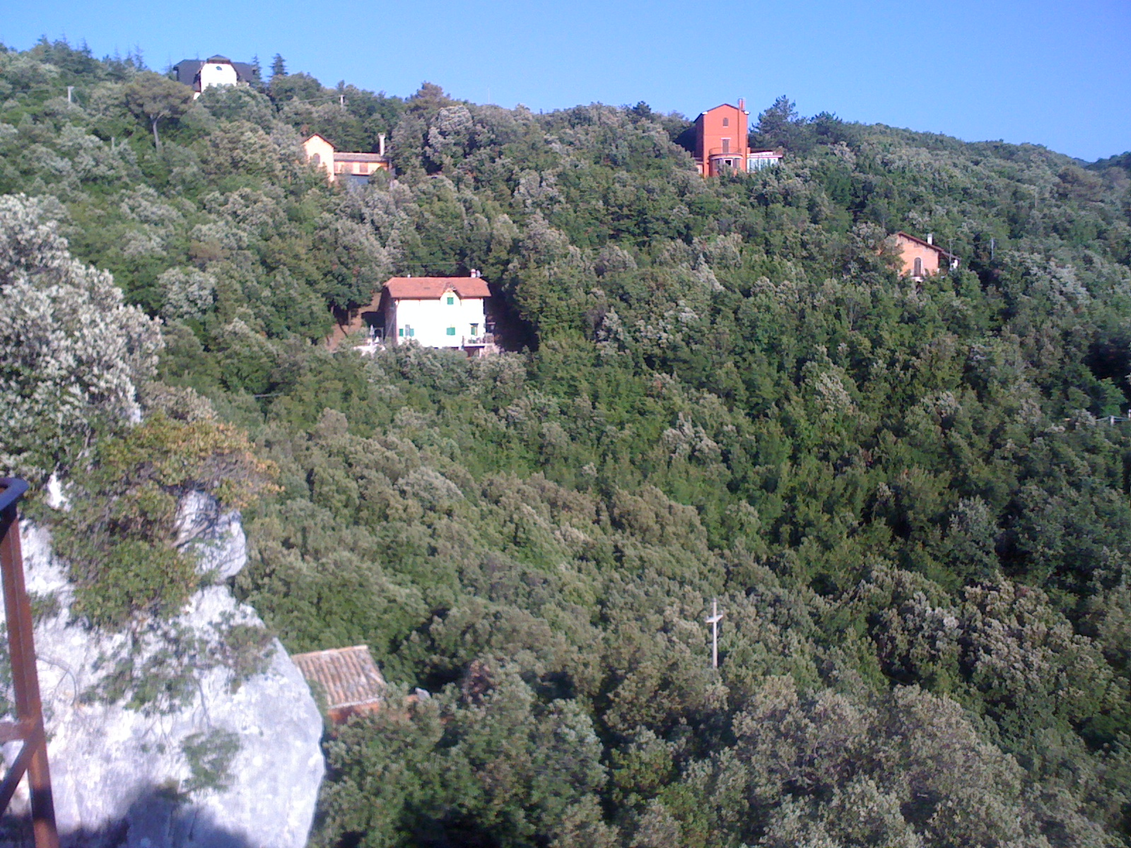 Villini, ex eremi, veduta dal Belvedere di Monteluco